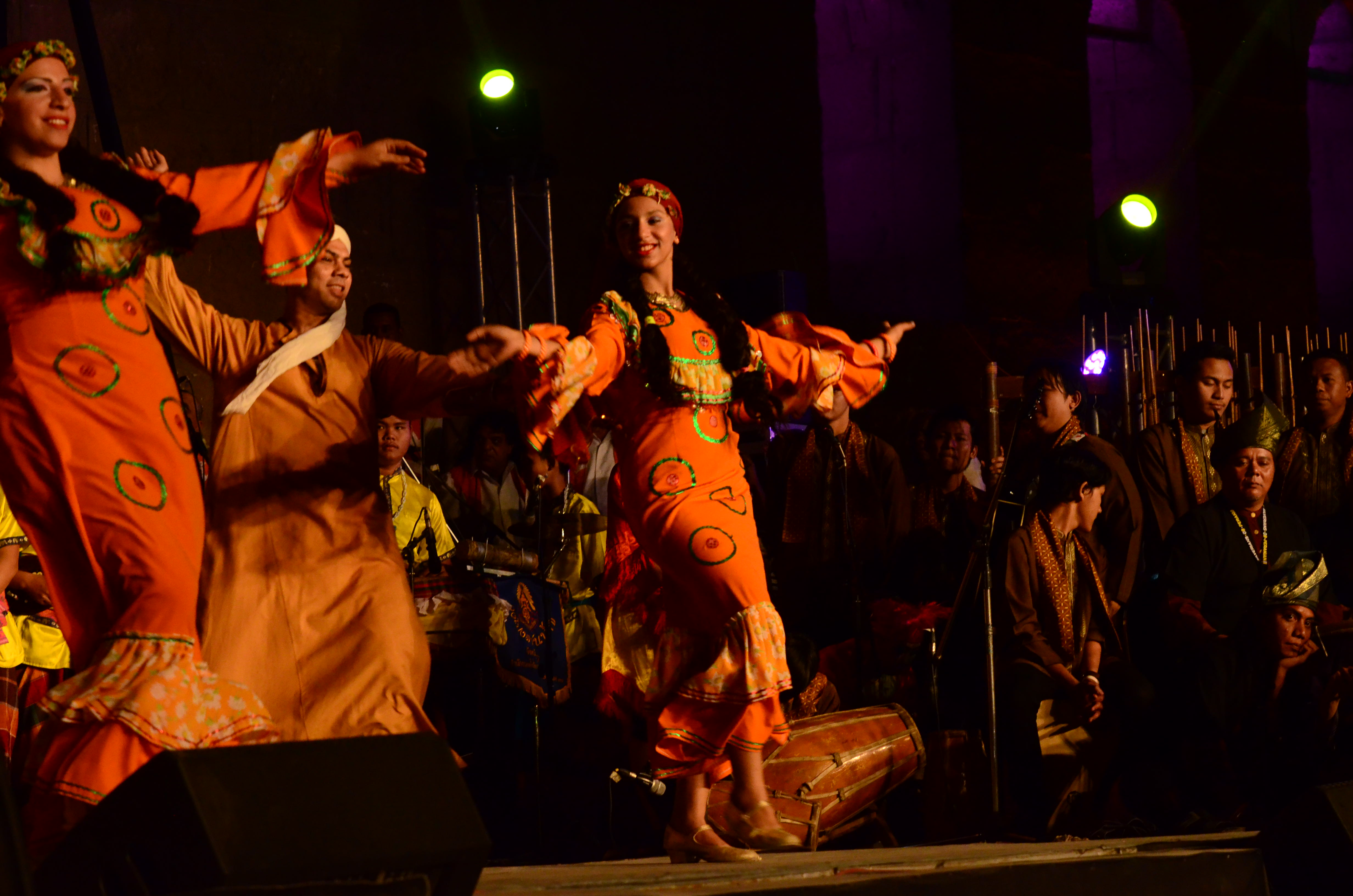 فرقة رقص شرقي من الفيوم This is an image of music and dance from Egypt